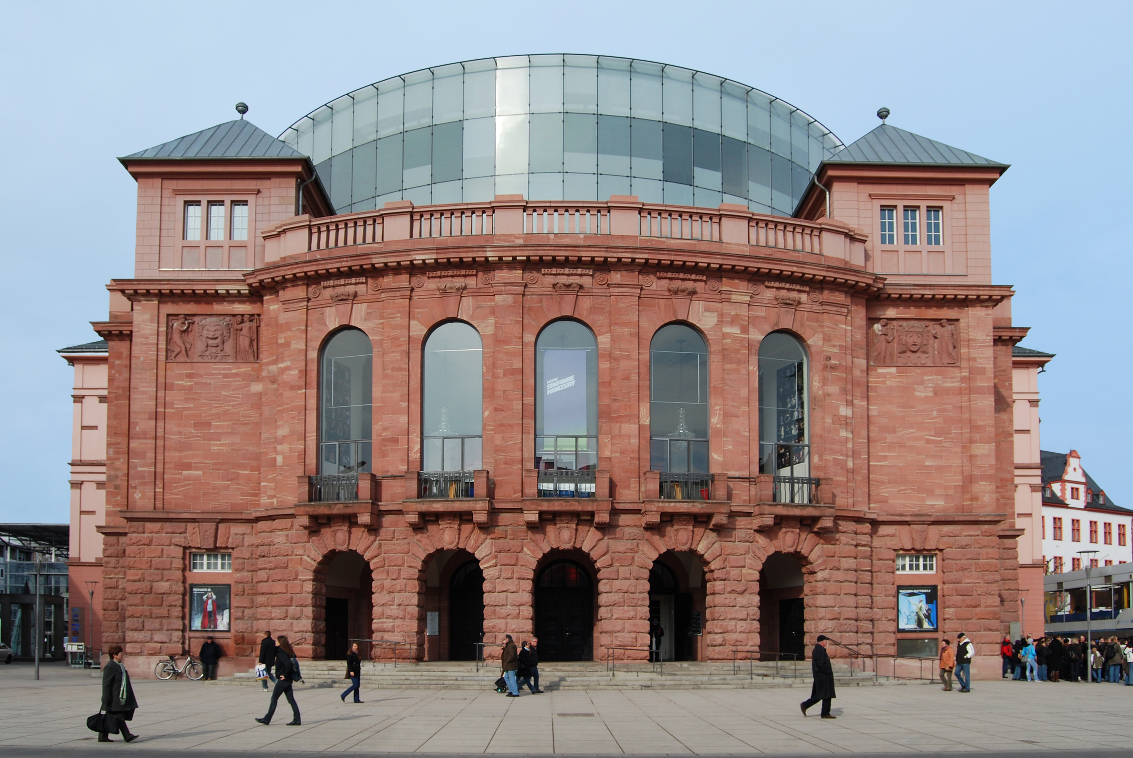 Das Staatstheater Mainz, Februar 2010